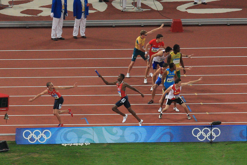 Relais 4x400 m Jeux olympiques d'été de 2008 - Jeremy Wariner, David Neville, Arnaud Ghislain, Chris Brown